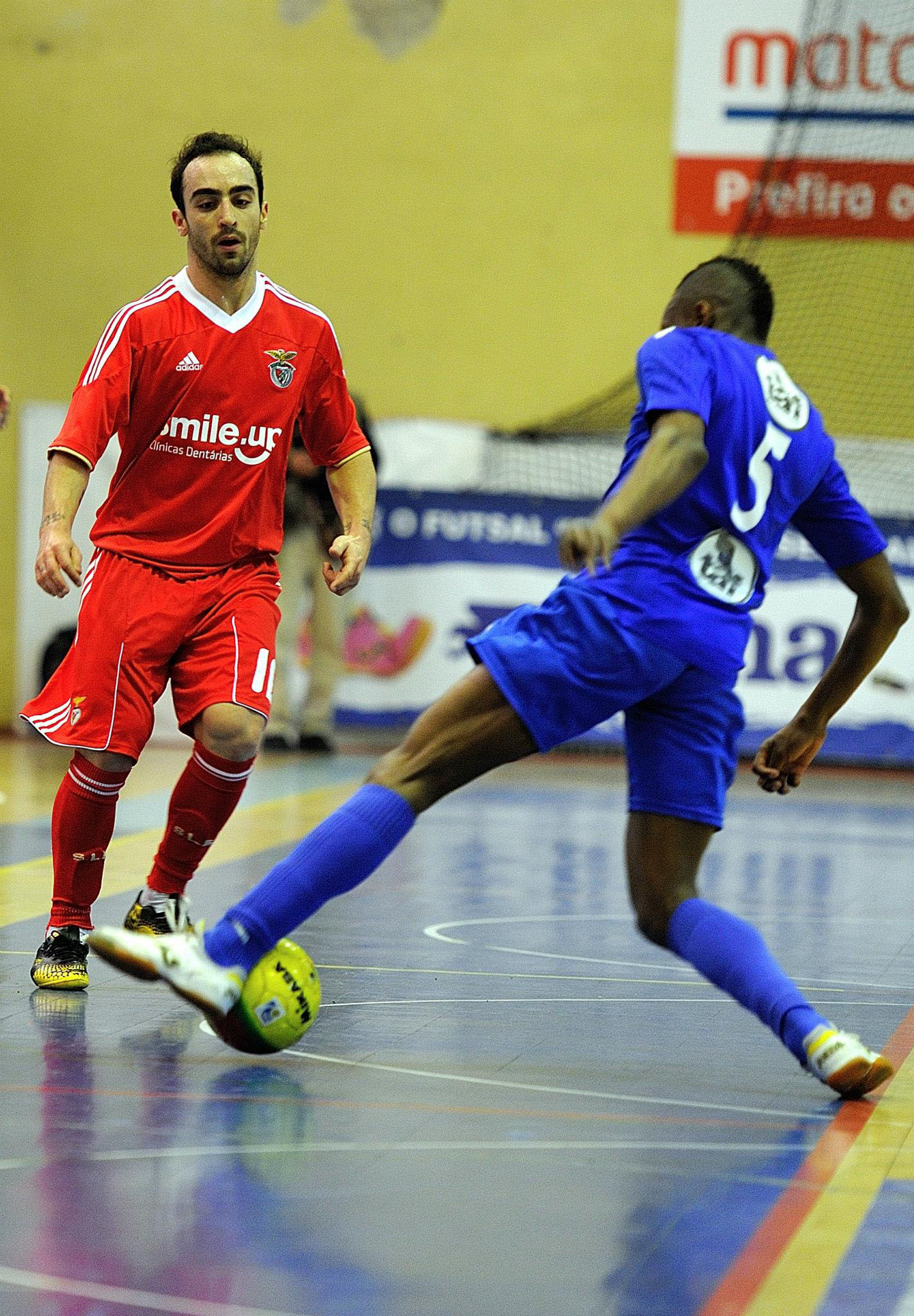 Ricardinho num jogo do Benfica com o Belenenses